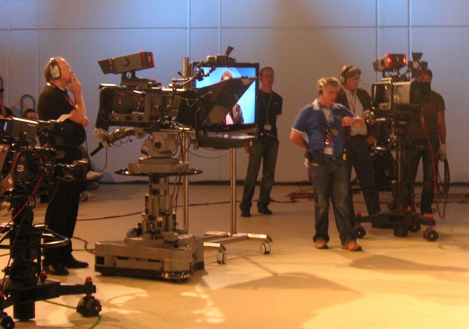 Professionell tv-kamera på "Funkausstellung" i Berlin